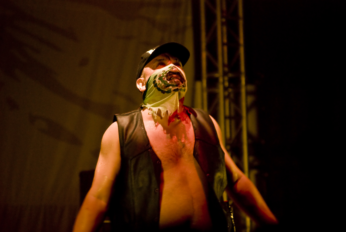 Juan Brujo, vocalista de la banda Brujeria, actuando en el Sziget festival de 2009.